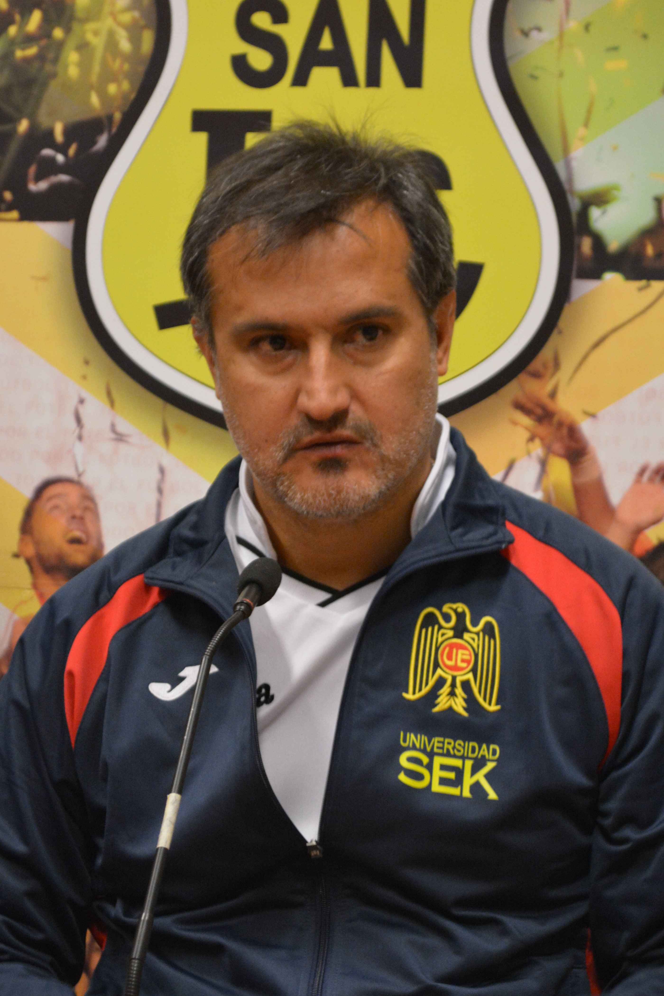 Fernando Vergara, entrenador de Unión Española. San Luis - Unión Española, 13-09-2015, Estadio Municipal Lucio Fariña Fernández, Quillota, Chile